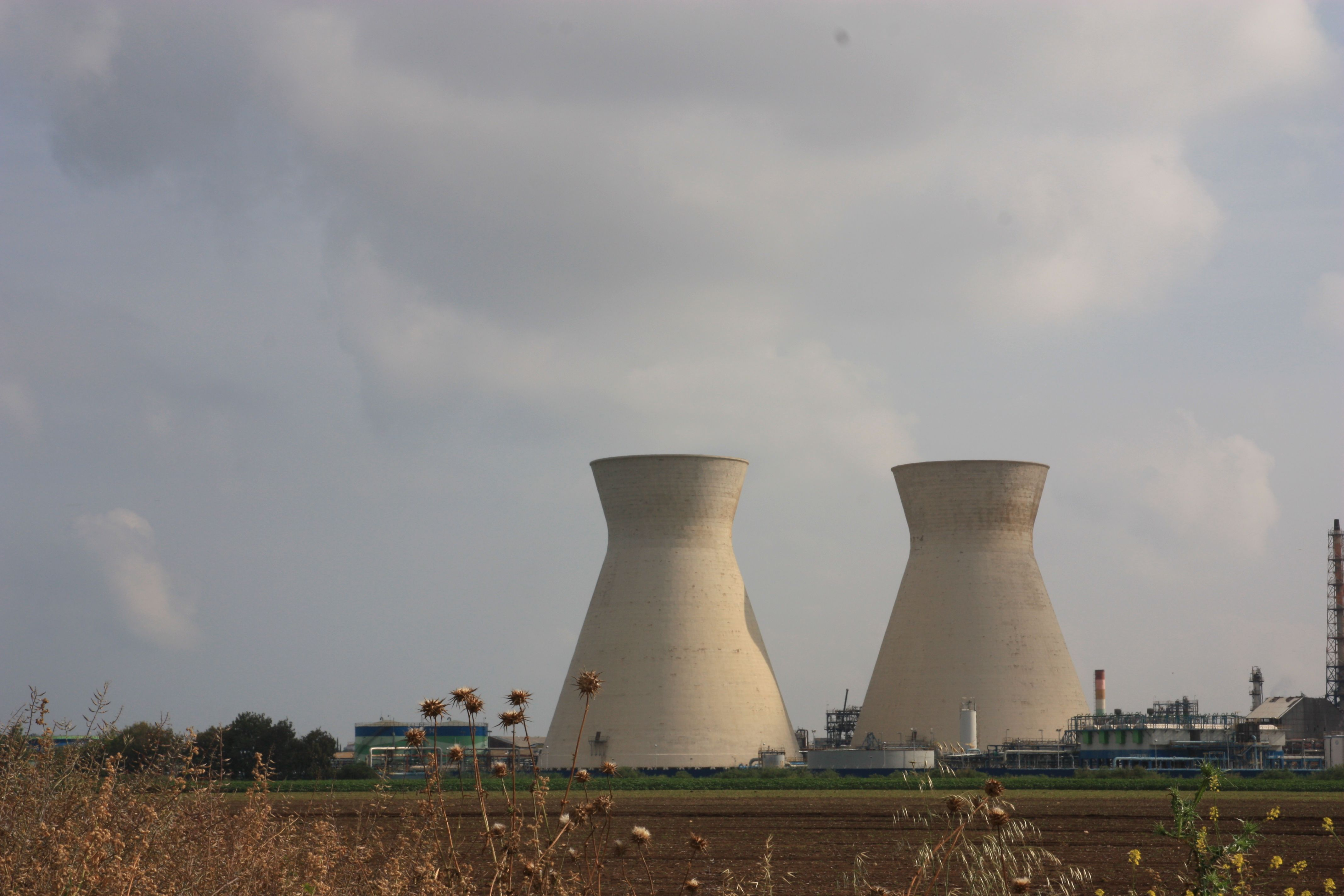 הלבניות, מתחם בז"ן, מפרץ חיפה